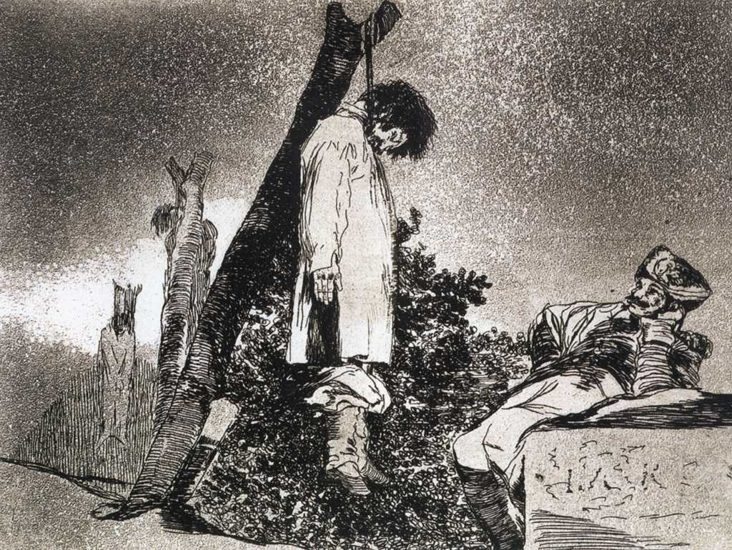 un petit mec assez sympa qui est pendu! oh lala